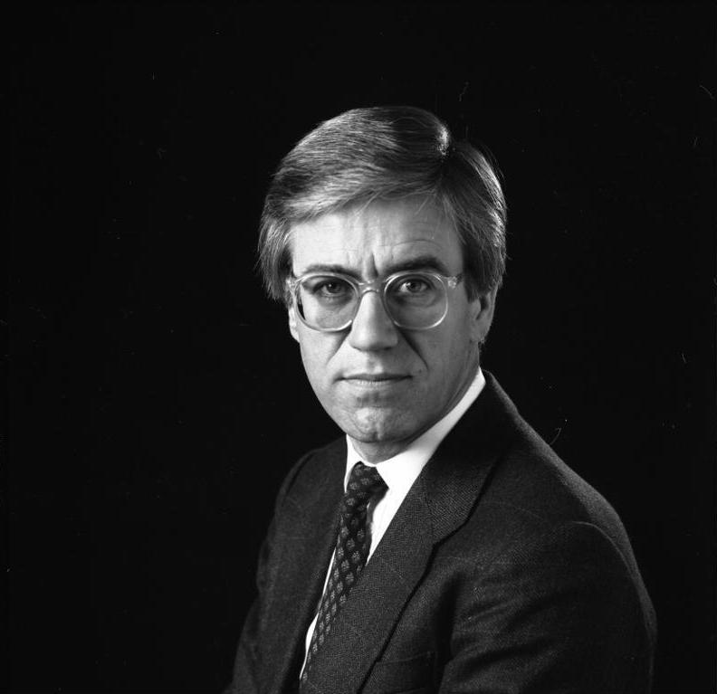 6.12.1985 Dr. Michael Bürsch, Büro Helmut Schmidt, Bundeskanzleramt a. D.